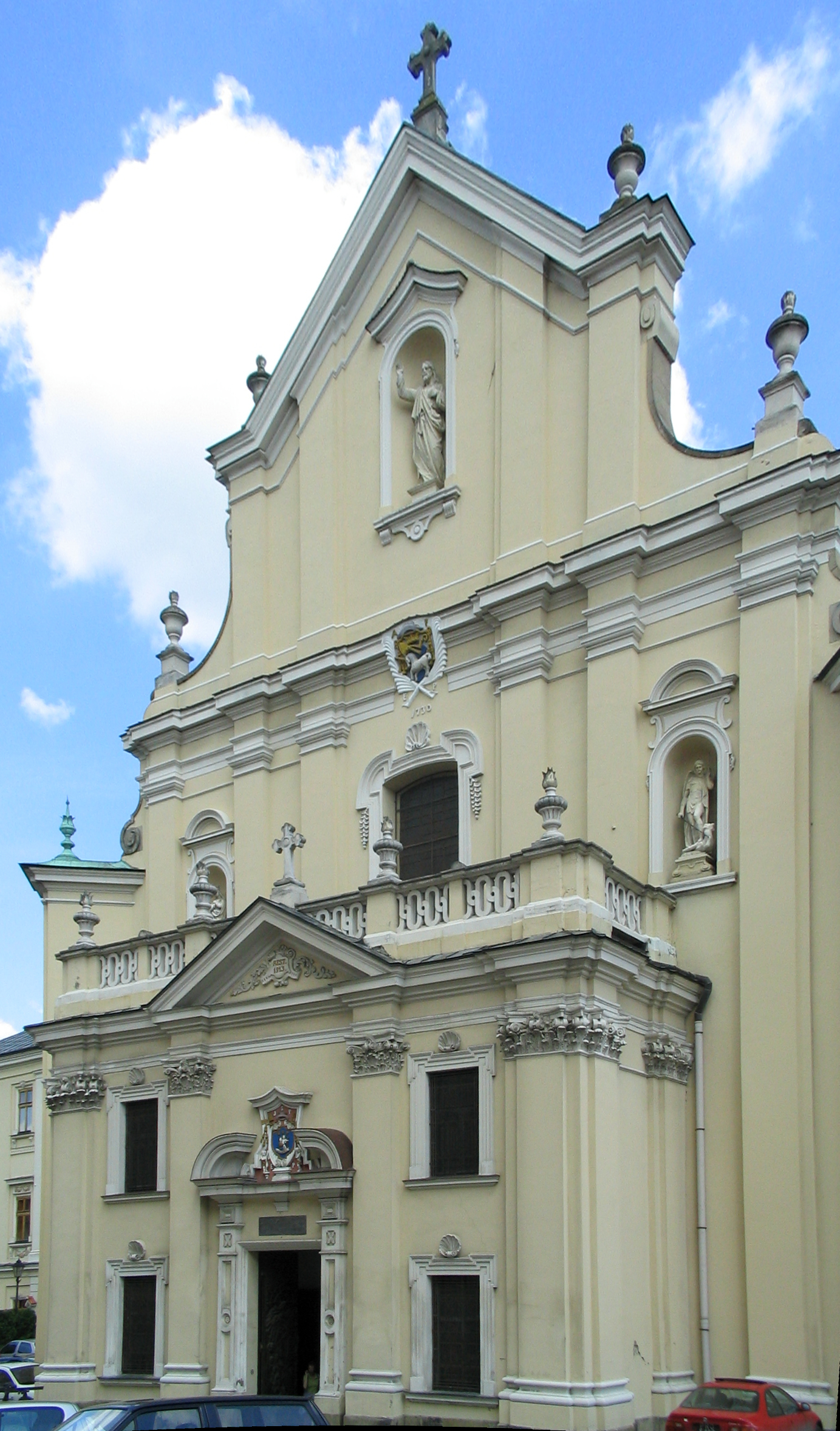 Bazylika Archikatedralna pod wezwaniem Jana Chrzciciela w Przemyślu